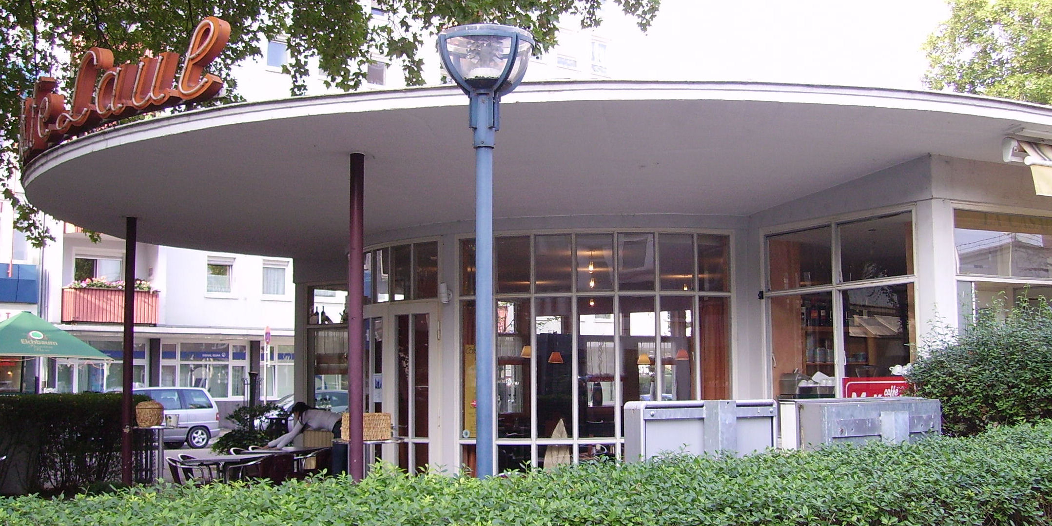 Ludwigsplatz in Ludwigshafen, Germany